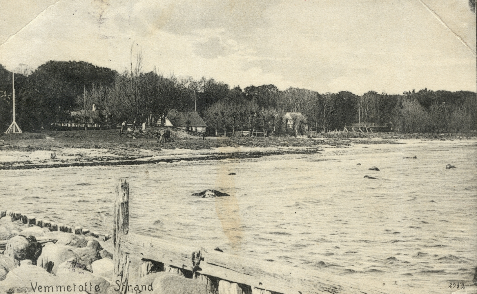 Vemmetofte strand i begyndelsen af 1900-tallet